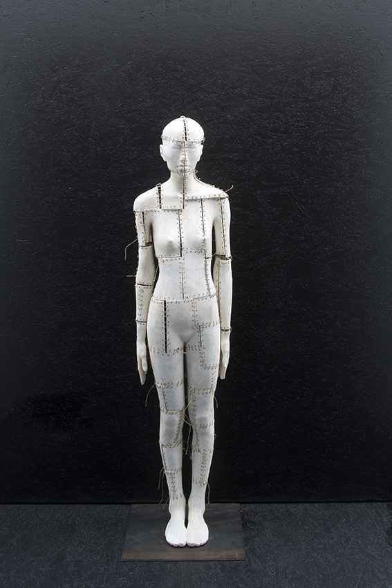 Skulptur